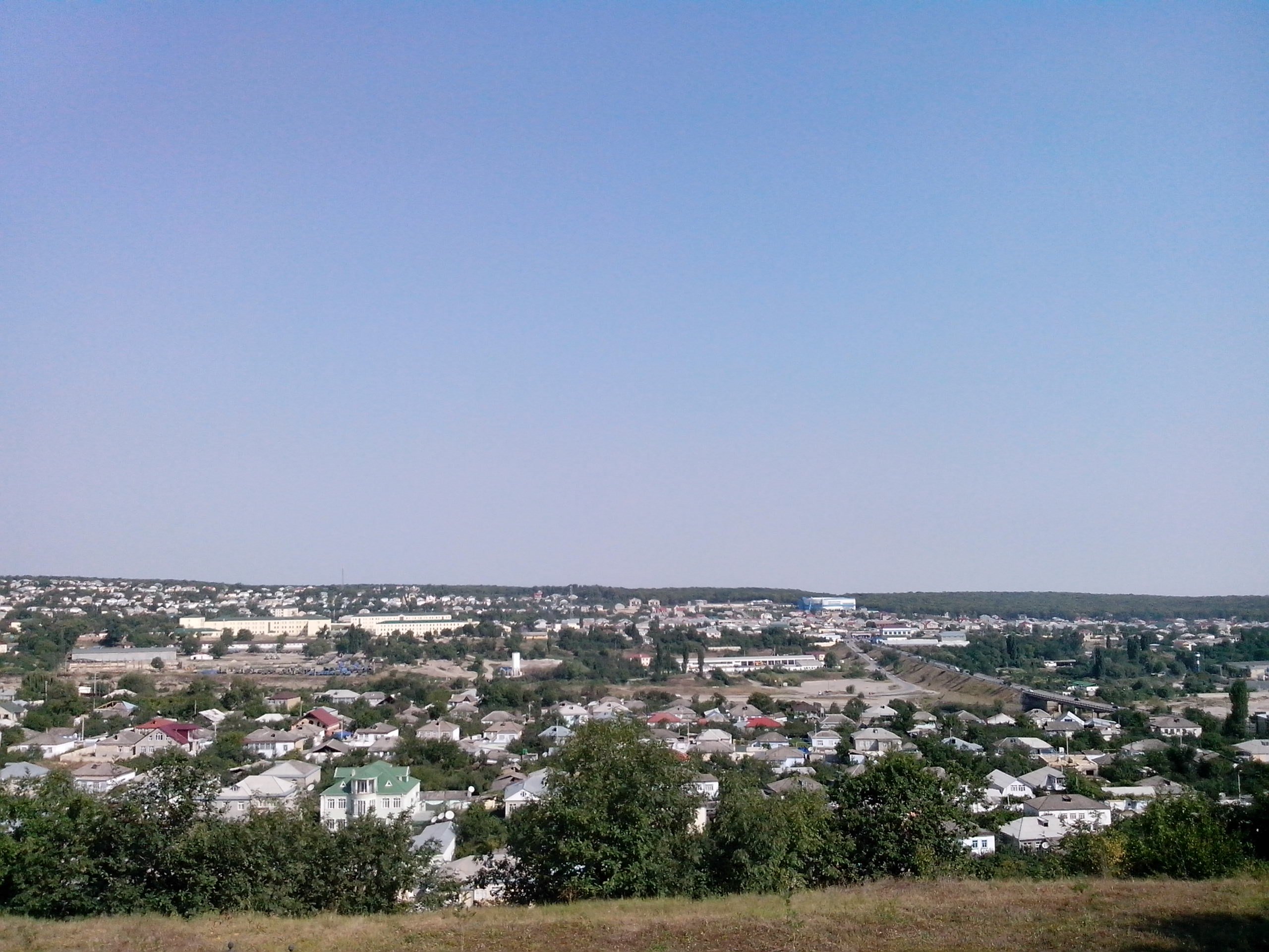 Qusar